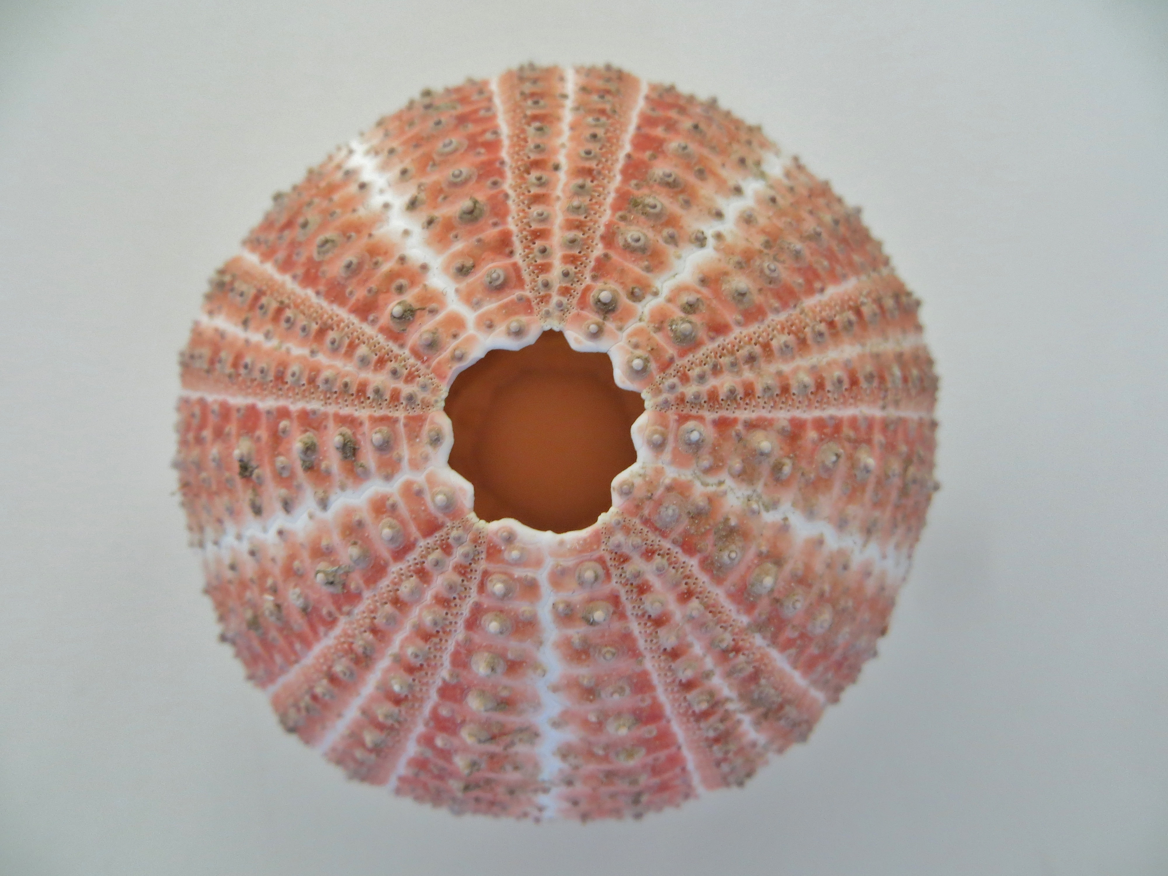 Le test d'un oursin pointu Gracilechinus acutus. Provenance : Observatoire océanographique de Banyuls-sur-mer. (identification : Frédéric Ducarme & Andreas Kroh).